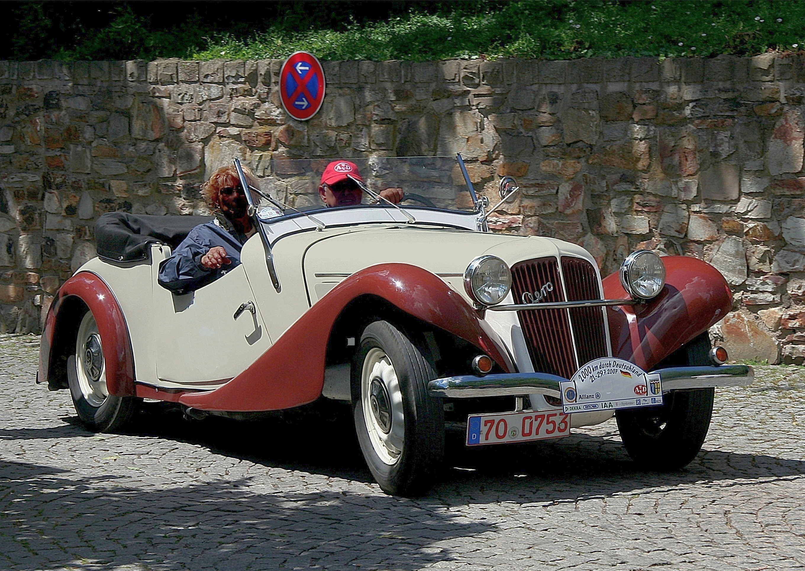 Aero 30 Roadster, Baujahr 1936 (992 cm³, 30 PS) bei den „2000 km durch Deutschland“ in Montabaur. license plate changed